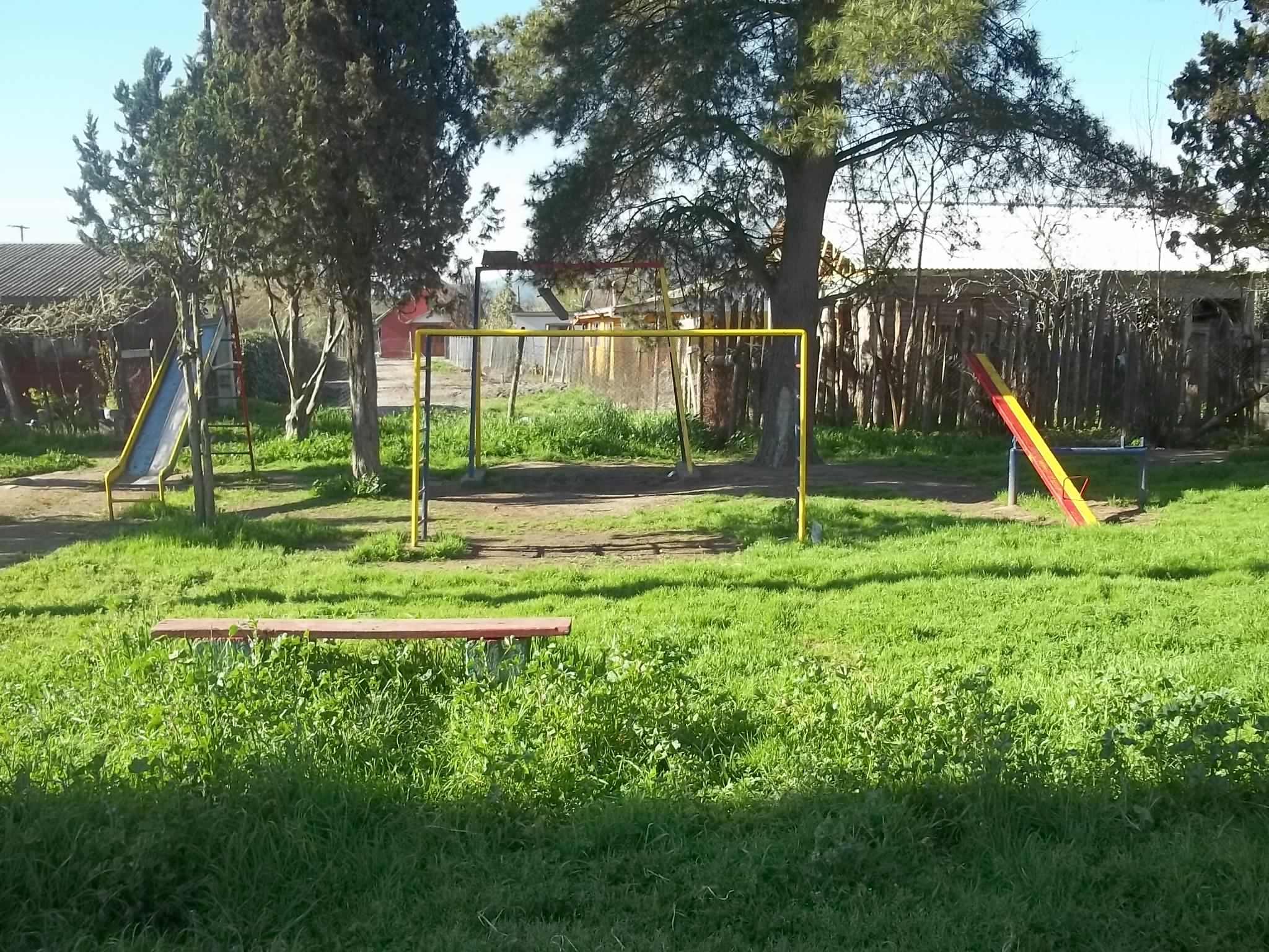 plaza ubicada dentro de la población santa victoria